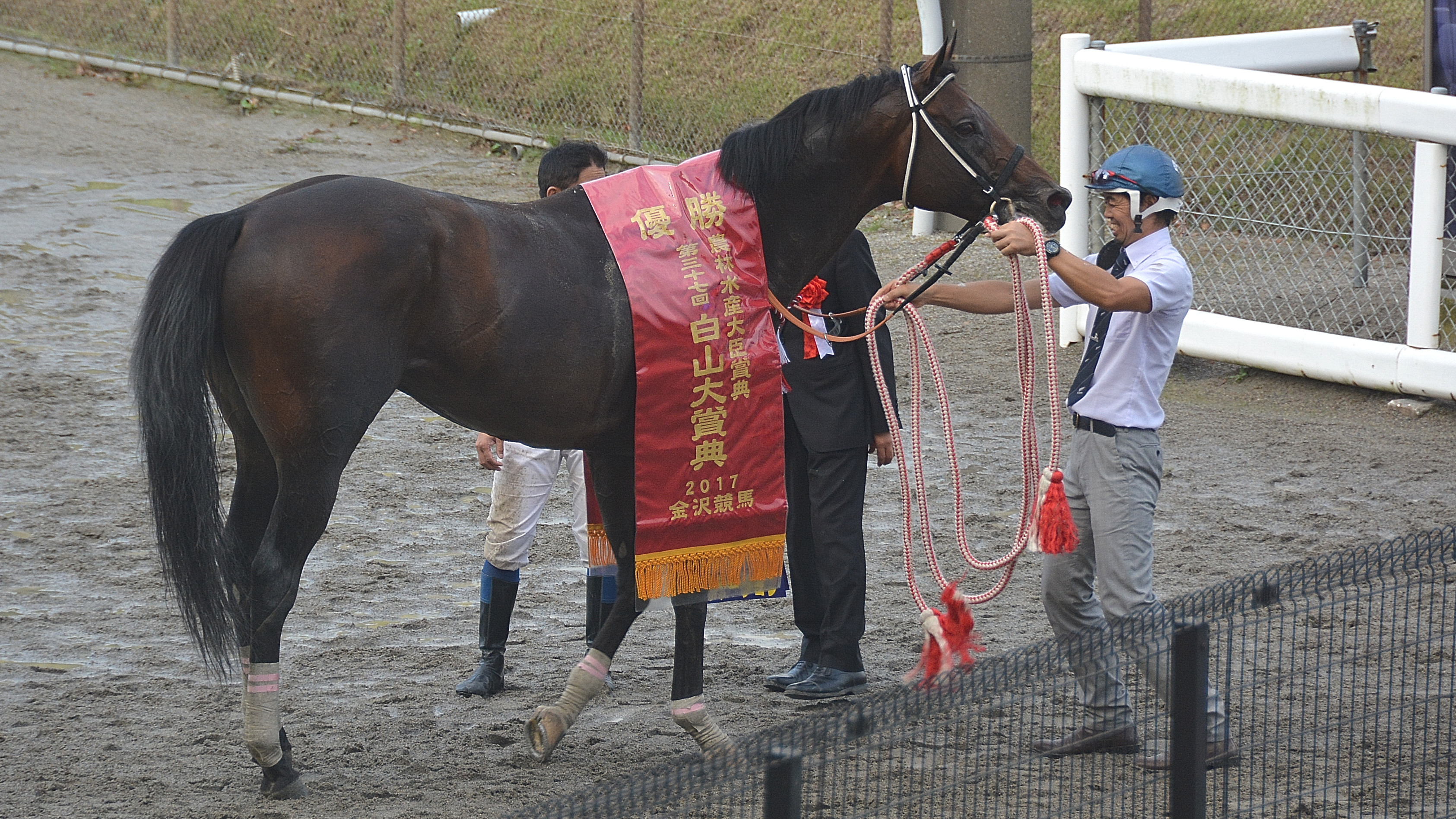 2017年10月3日に金沢競馬場の第11競走で行われた、「第37回白山大賞典」の優勝レイを着装した優勝馬インカンテーションを、観客席から撮影したもの。